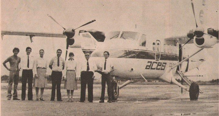 Twin Otter de Aces en el aeropuerto Farfan de Tulua, cubria la ruta Bogota-Tulua-Bogota a mediado de los 70s